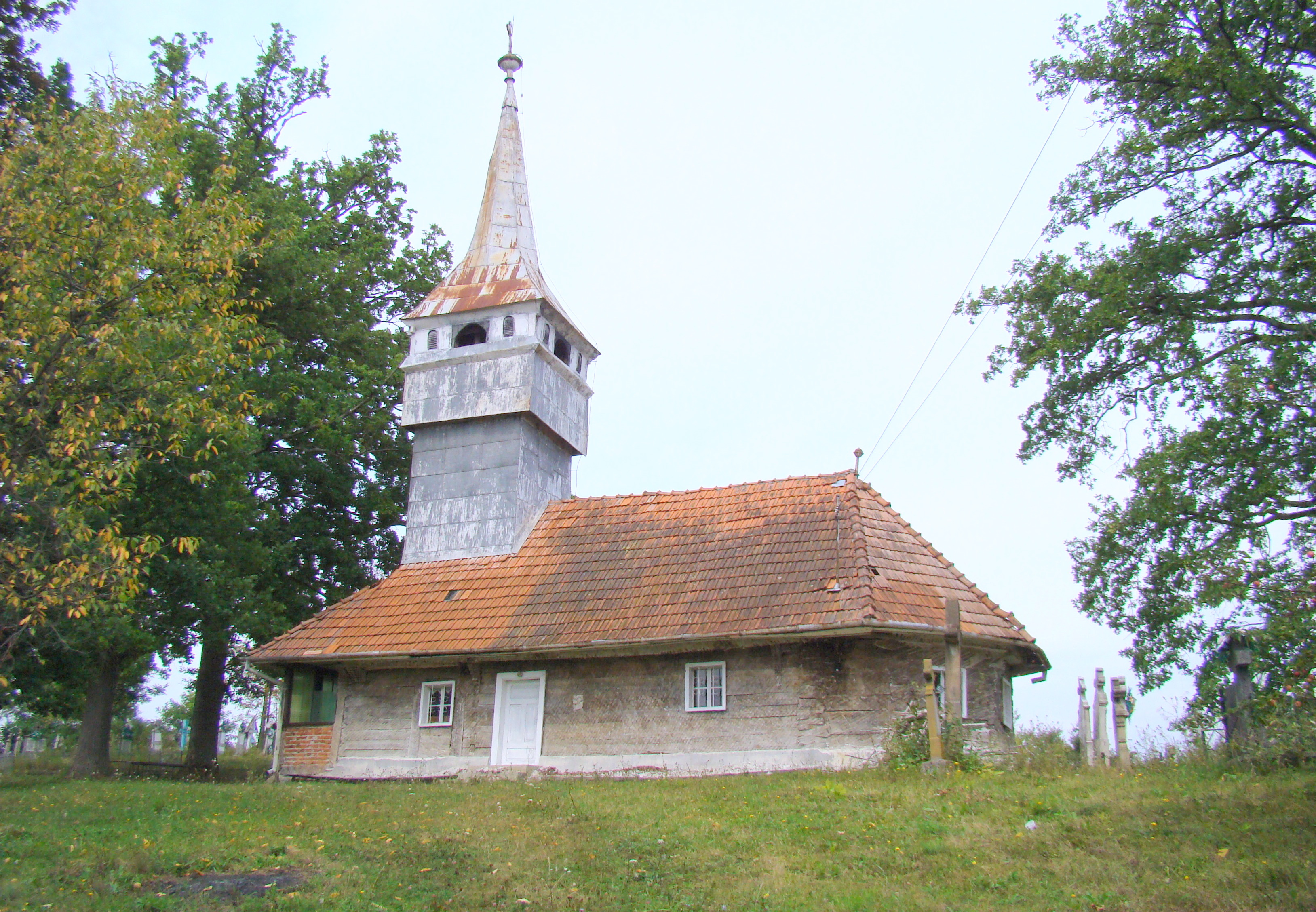 Biserica de lemn „Adormirea Maicii Domnului” din Tiulești-Hunedoara